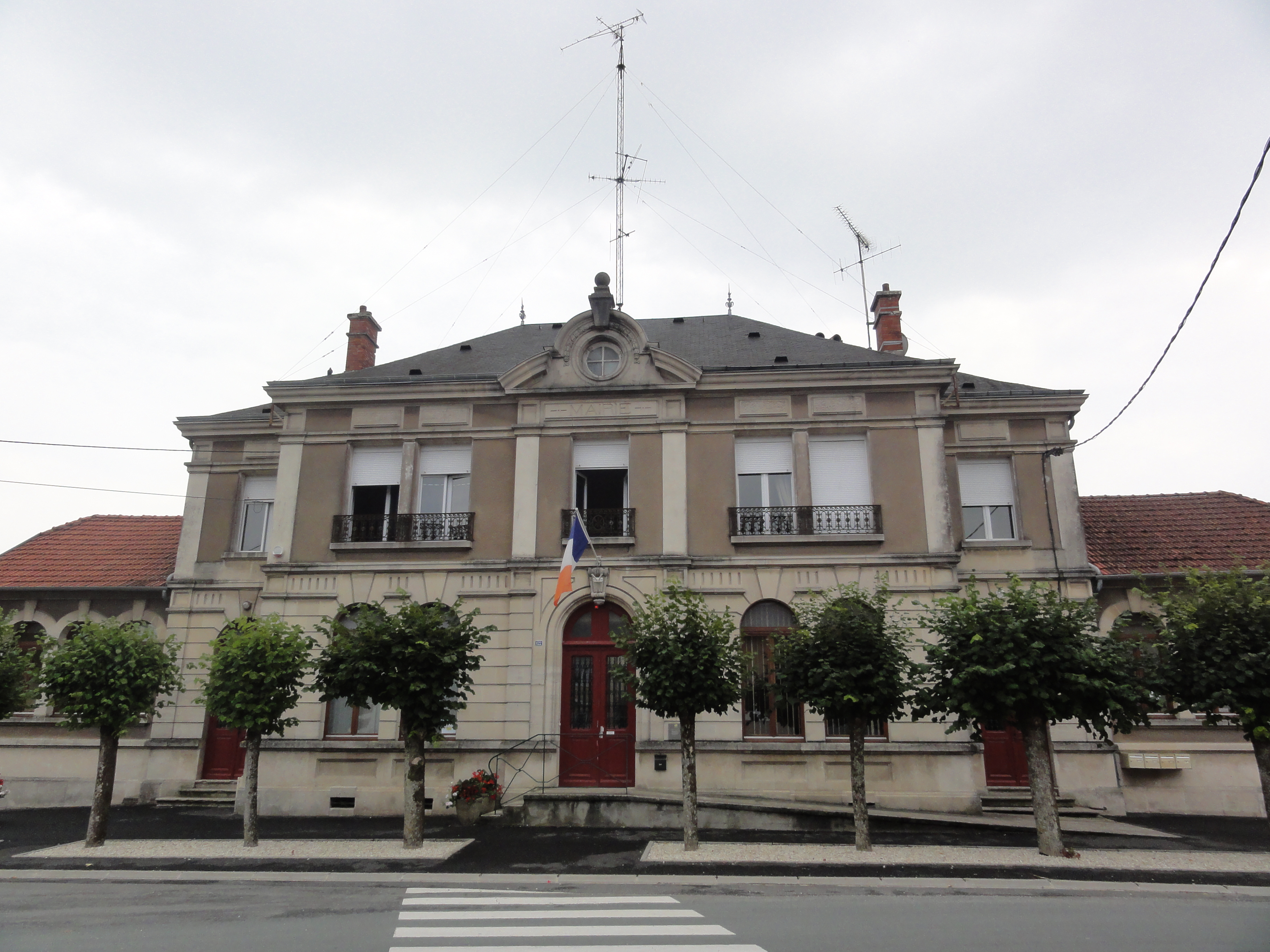 Dombasle-en-Argonne (Meuse) mairie